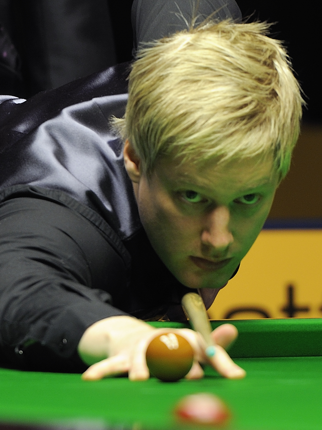 Neil Robertson in Berlin during the Snooker German Masters in 2013